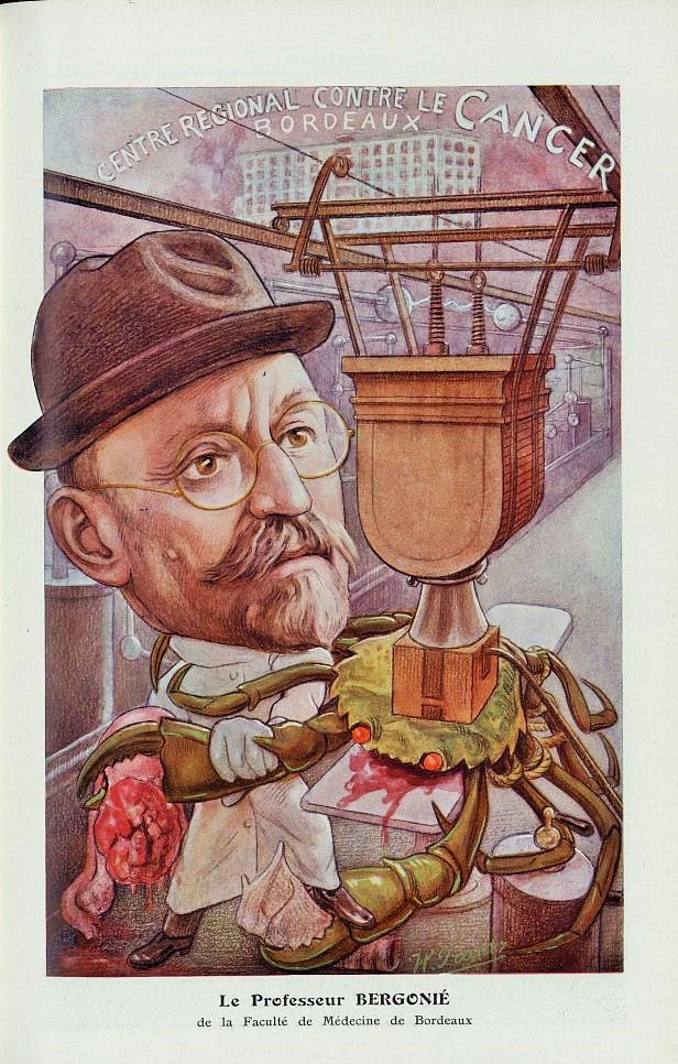 Le Professeur Bergonié de la Faculté de médecine de Bordeaux, par H. Frantz, Chanteclair . - 1924. - 19e année Pour établir des liens vers ce document, utiliser les URL ci-dessous : Livre : Page